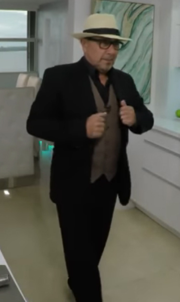 Todos los miércoles tenemos una cita en mi casa 6:00 pm EST/3:00 pm PST “María Marín Live”